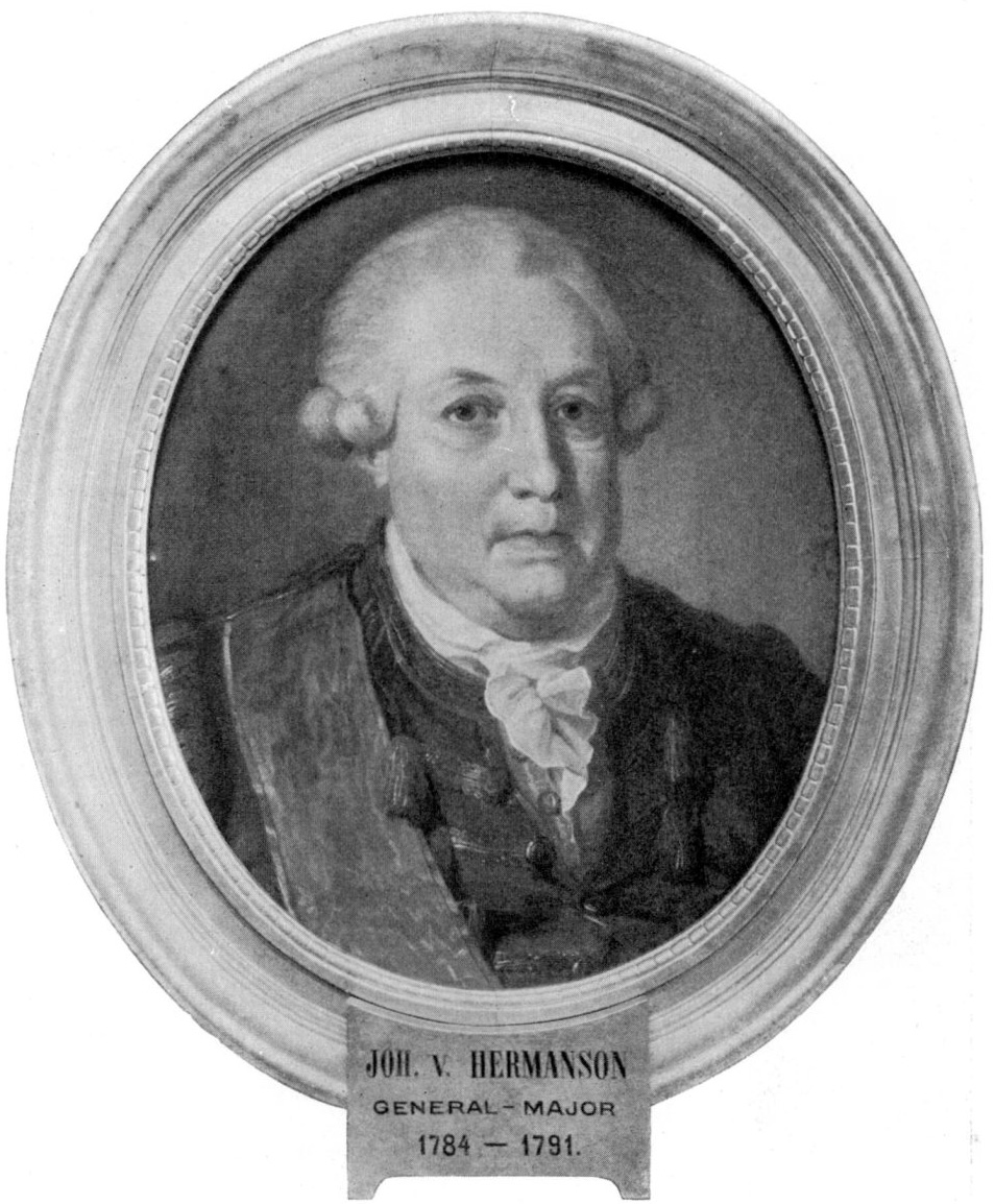 Johan von Hermansson (1726–1793). Pudrad peruk, bröstkrås, blå uniform med guldrevärer, svärdsordens band över höger axel, gulbrun fond.